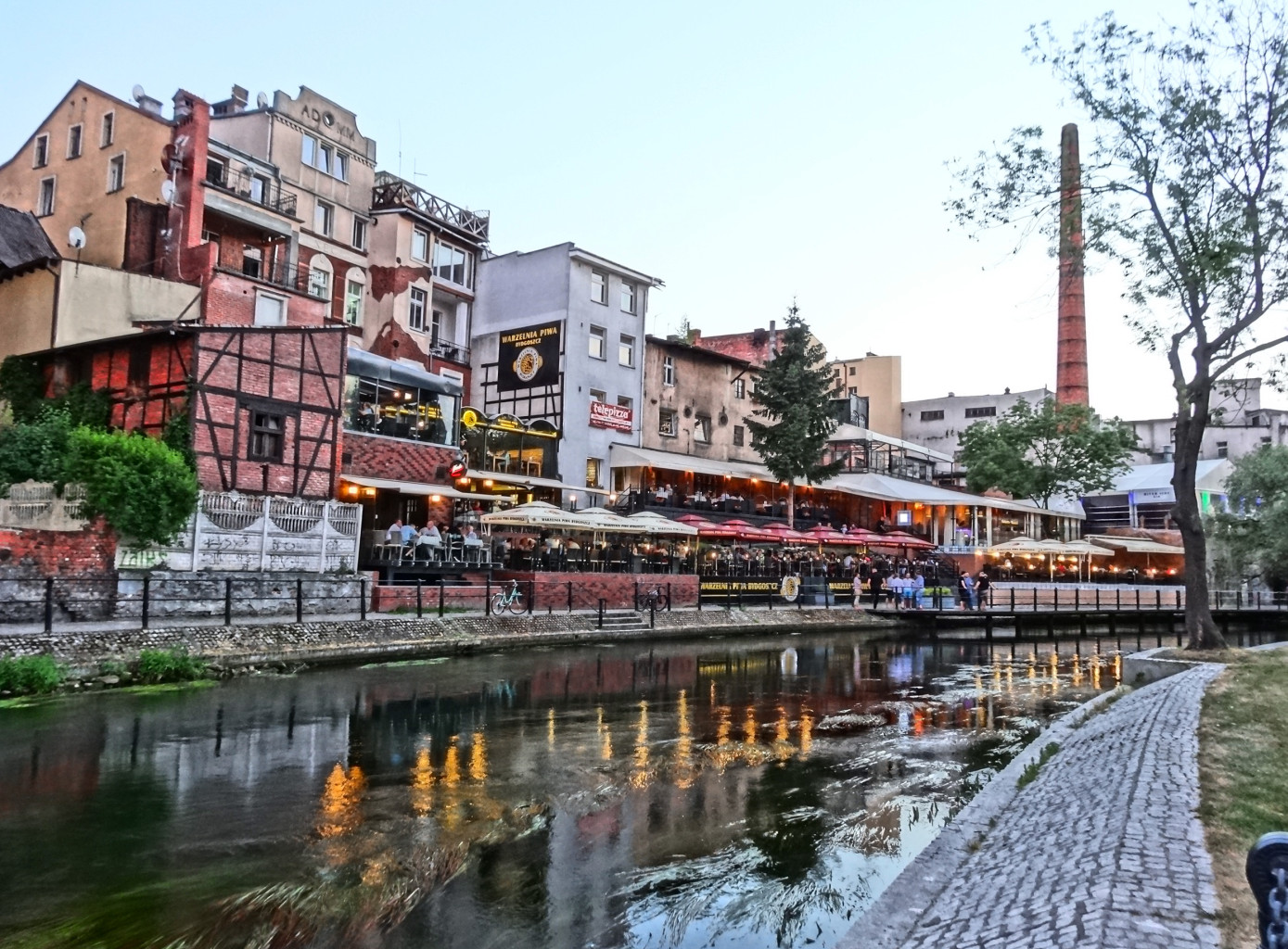 Wenecja Bydgoska – zespół architektoniczny Starego Miasta w Bydgoszczy zbudowany bezpośrednio nad rzeką Młynówką (zbud. 1870-1900).